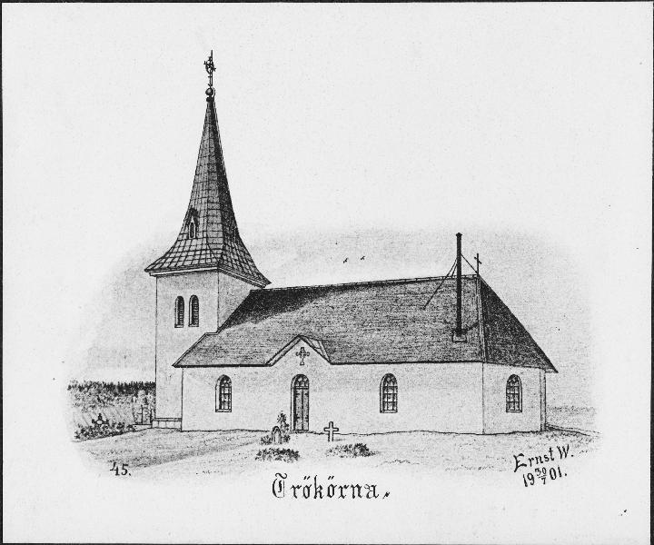 Kyrkan från sydöst. Tryck efter teckning av Ernst Wennerblad 1901.